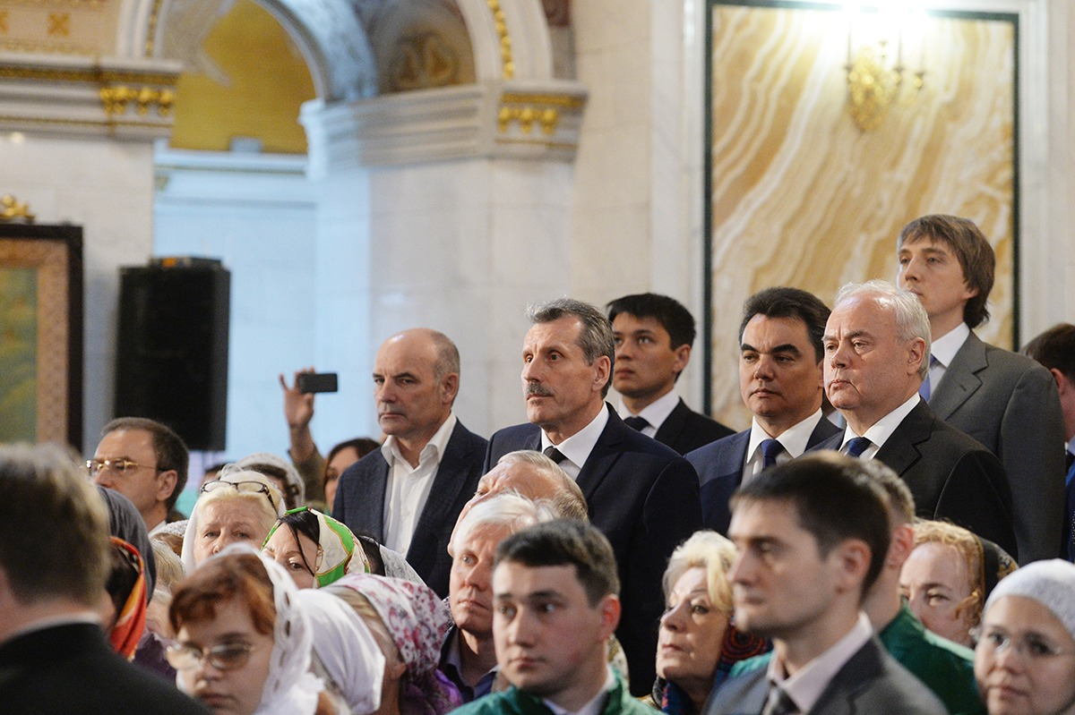 На вручении ордена